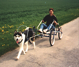 Sacco-Cart